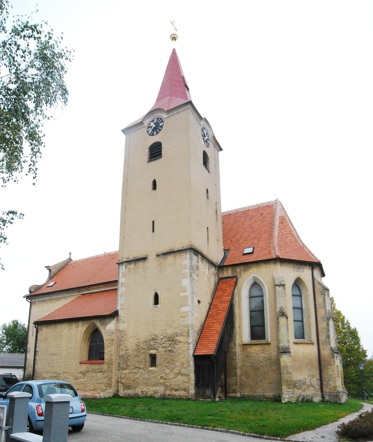 Die Pfarrkirche von Groß in Niederösterreich